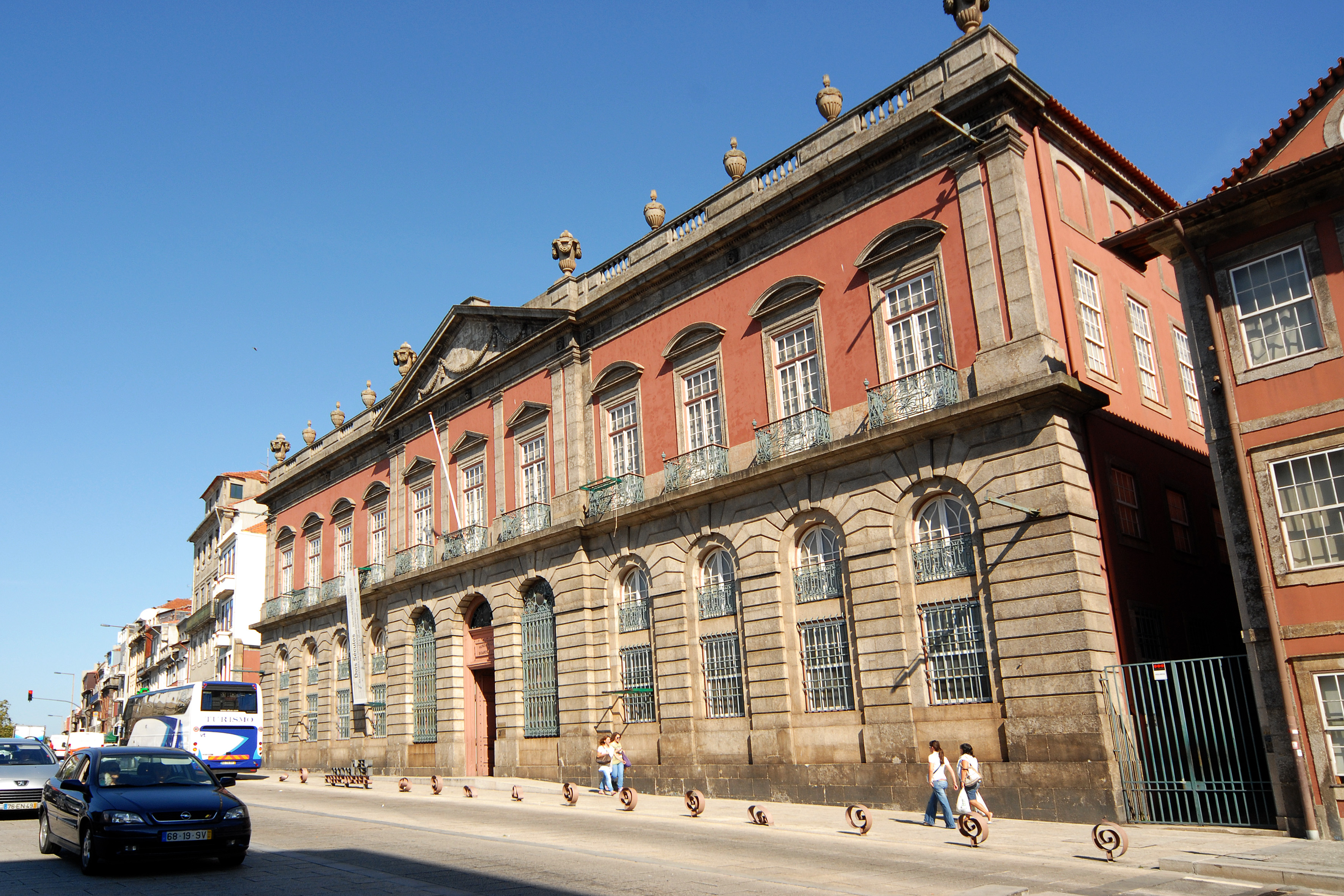 Museu Nacional de Soares dos Reis This file was uploaded for Wiki Loves Monuments in Portugal with the unique identifier 74508.